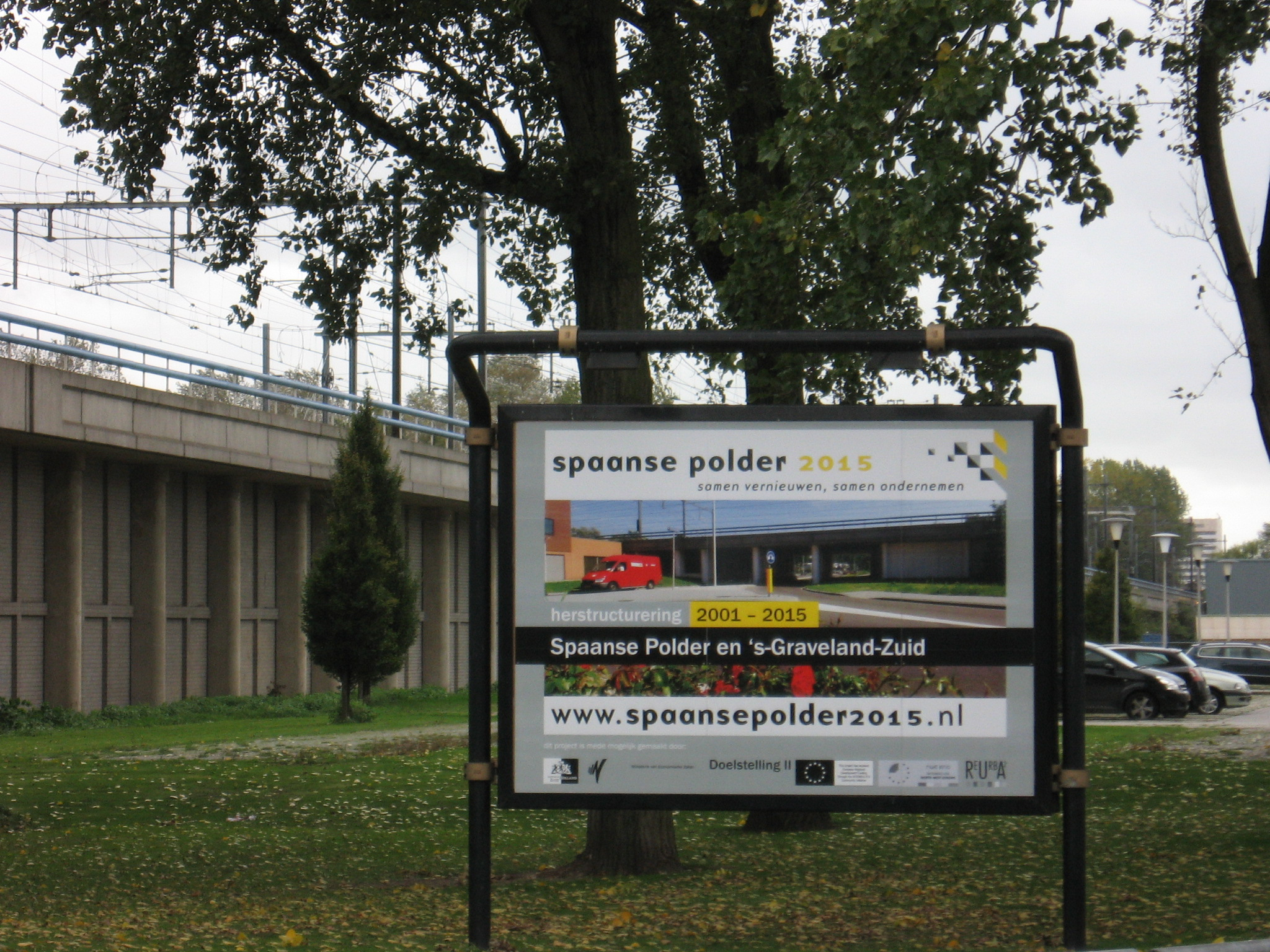 Spaanse polder affiche